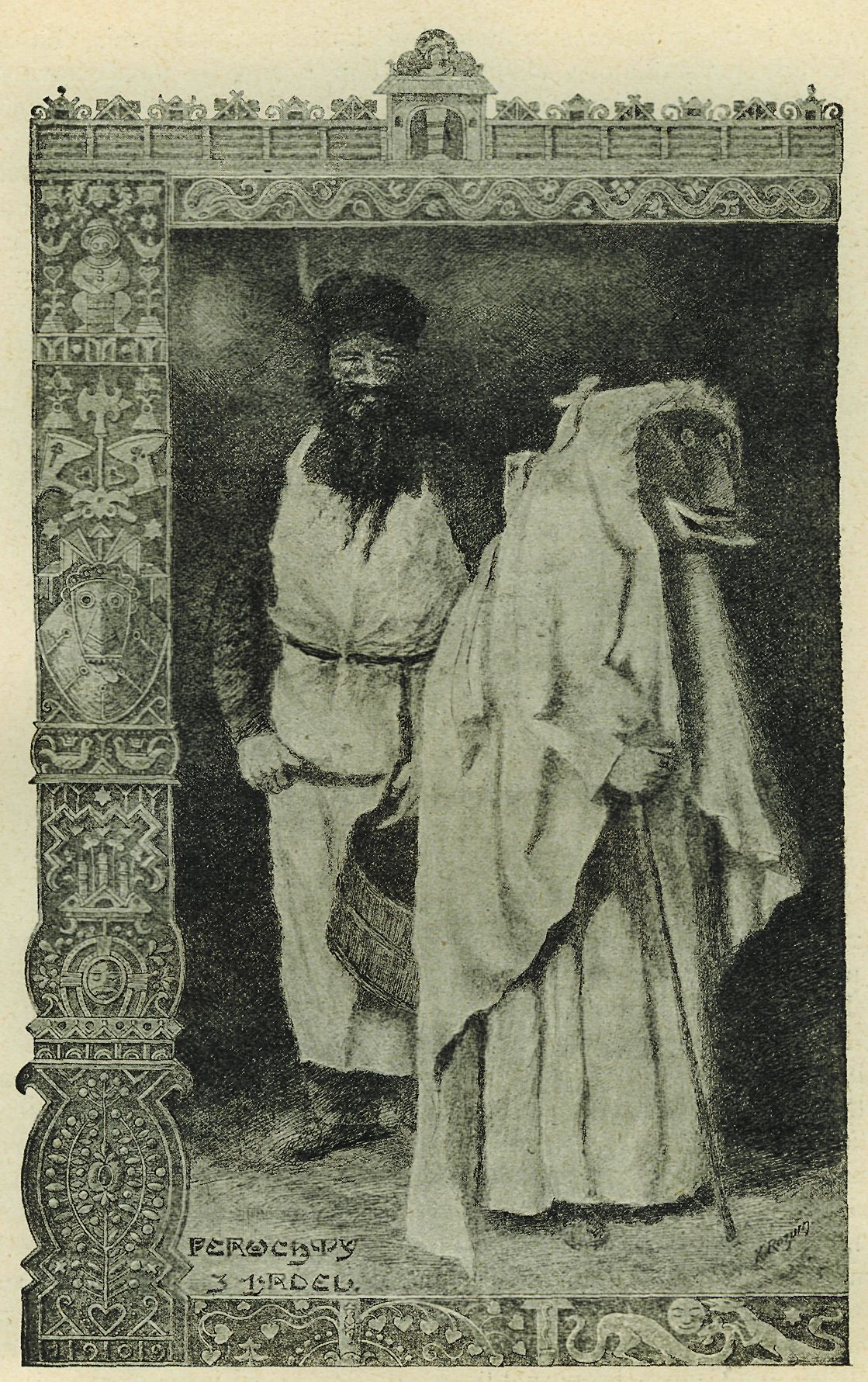 Перучта (Перхт; cs. Peruchty; en. Perchta)